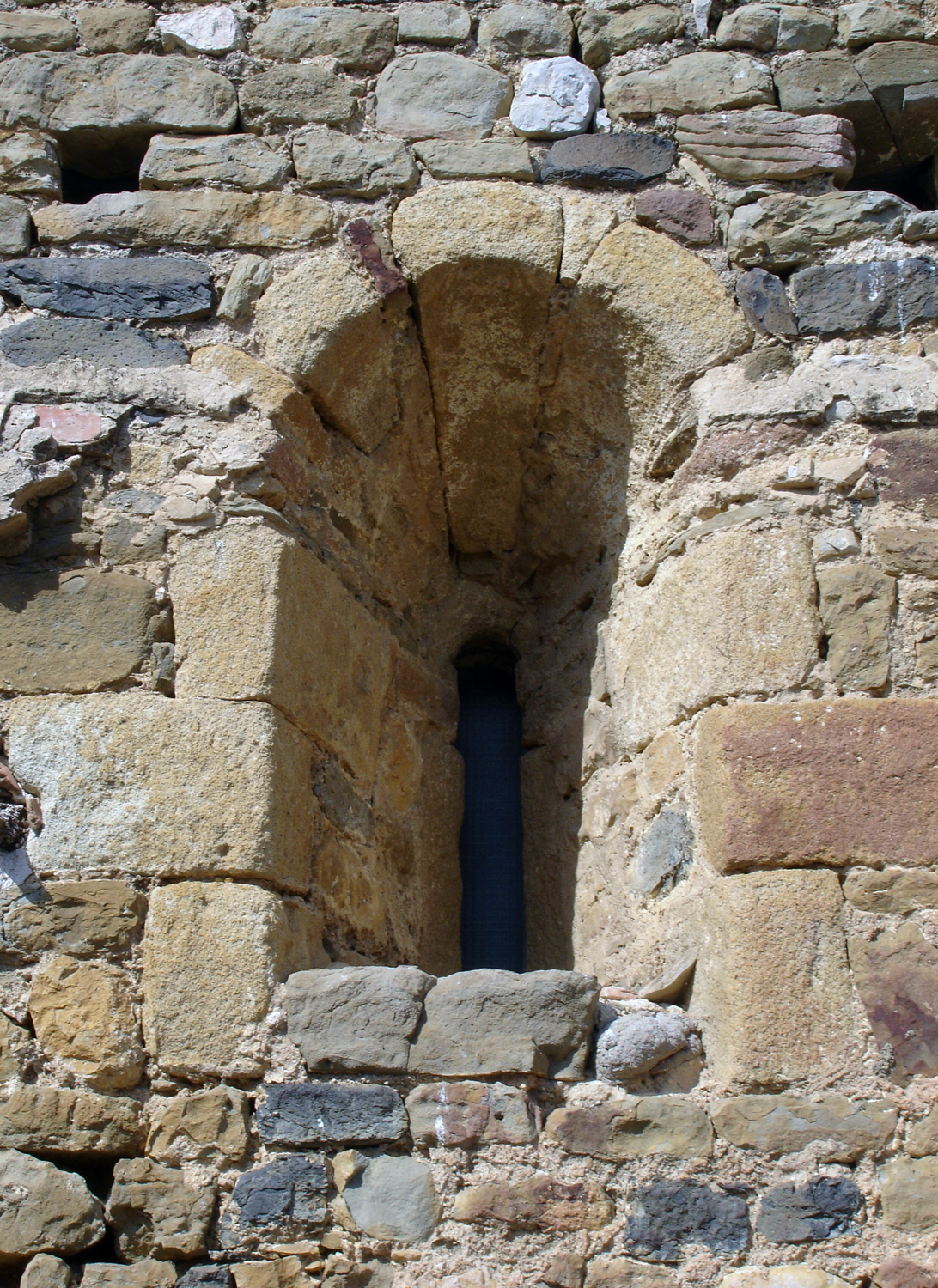 Esglèsia de Sant Esteve de Maranyà (Girona, Catalunya, Espanya)